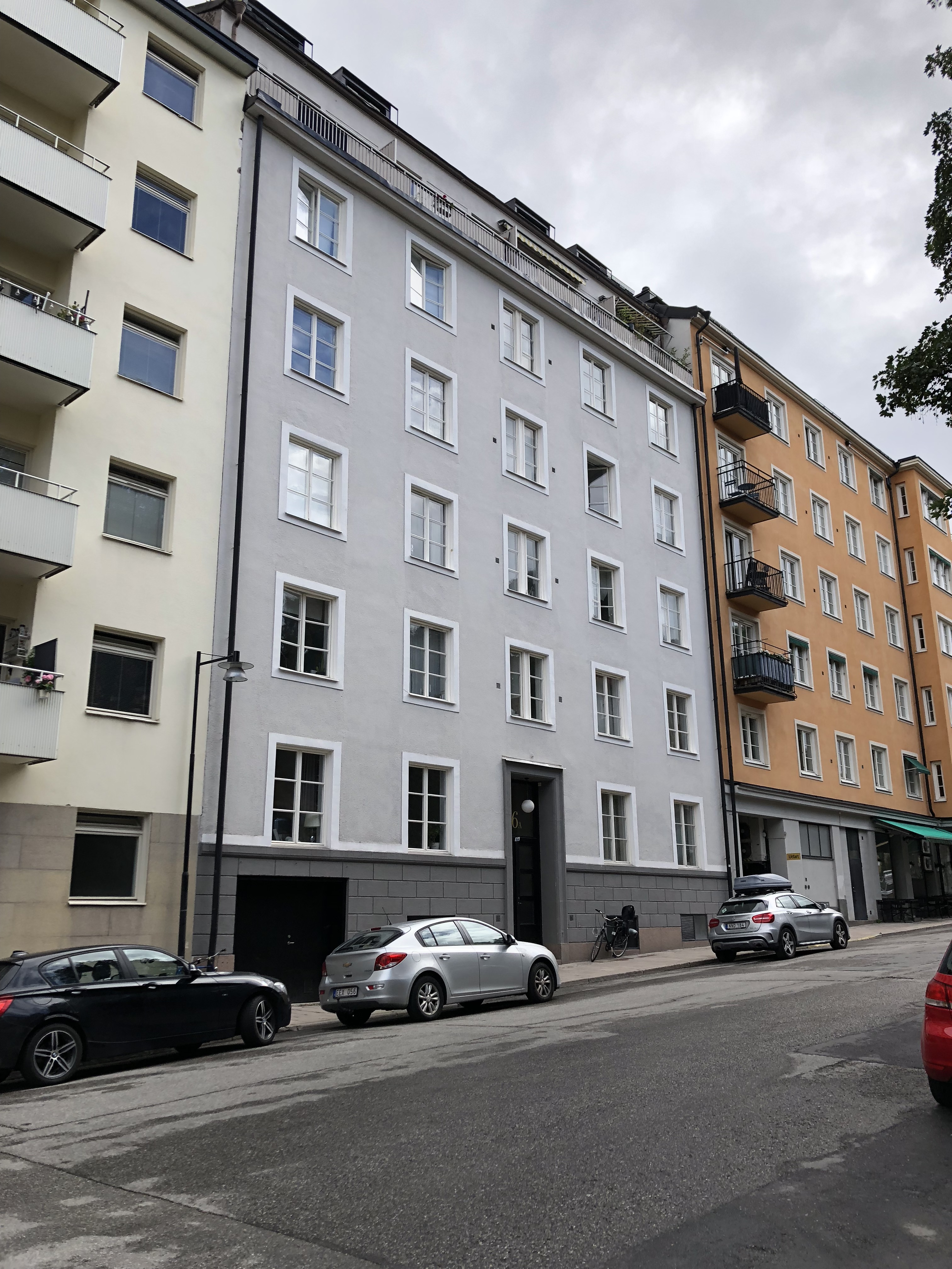 Dannemoragatan 16 A i Stockholm, fastigheten Sländan 12.